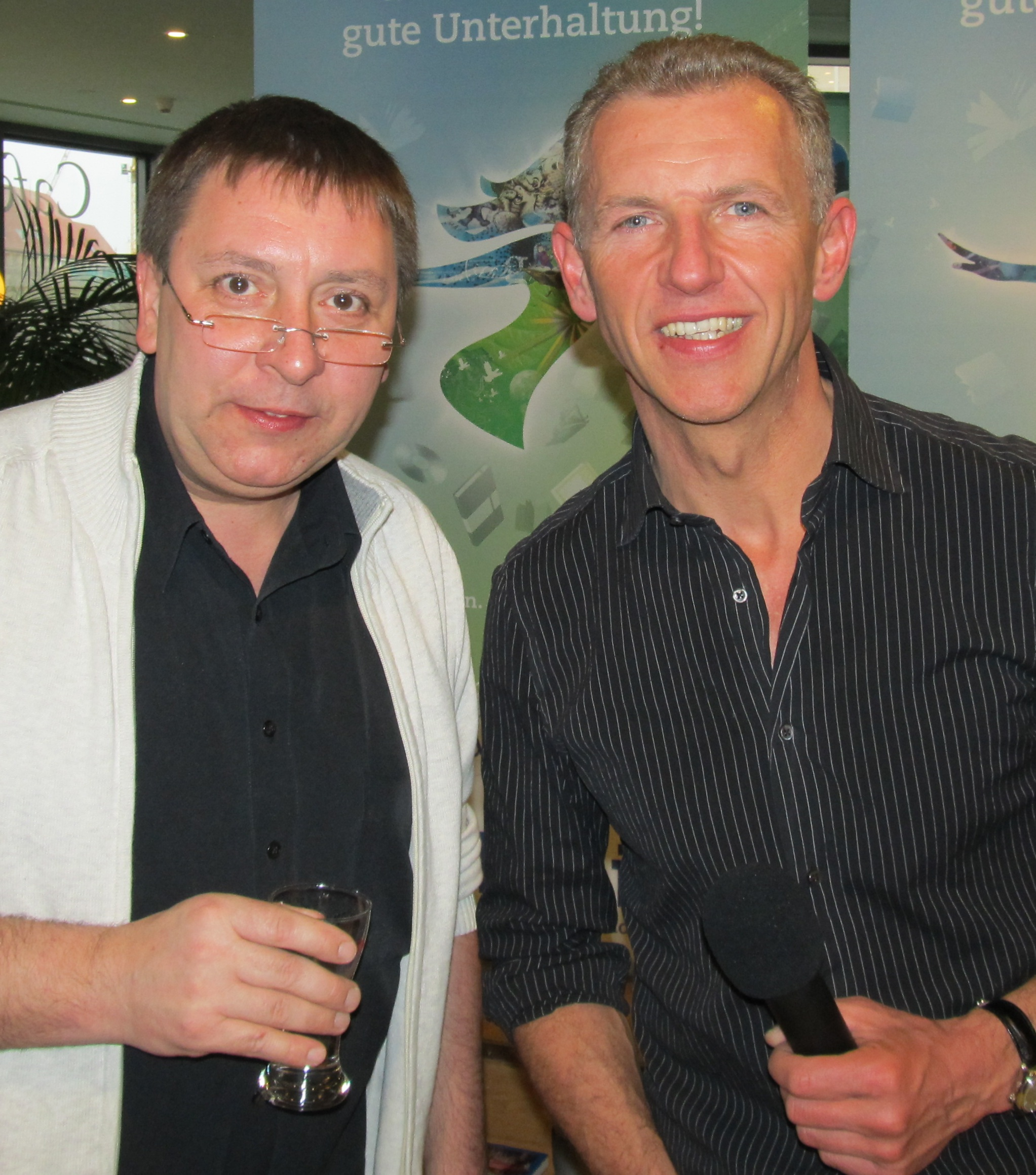 Thomas Böttcher (li.) und Uwe Fischer, Radiomoderatoren, bekannt als Moderatorenduo Böttcher & Fischer von R.SA, vormals bei Radio PSR und Antenne Sachsen